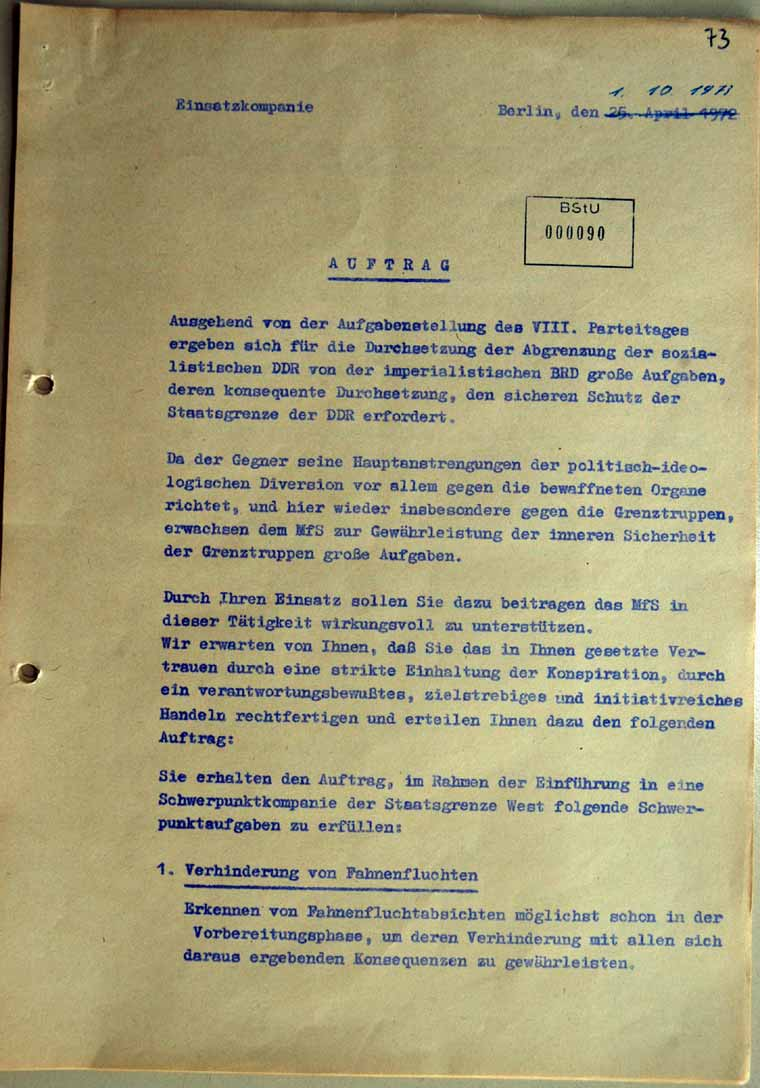 Schießbefehl der Einsatzkompanie der Hauptabteilung I „NVA und Grenztruppen“ des MfS, Seite 1